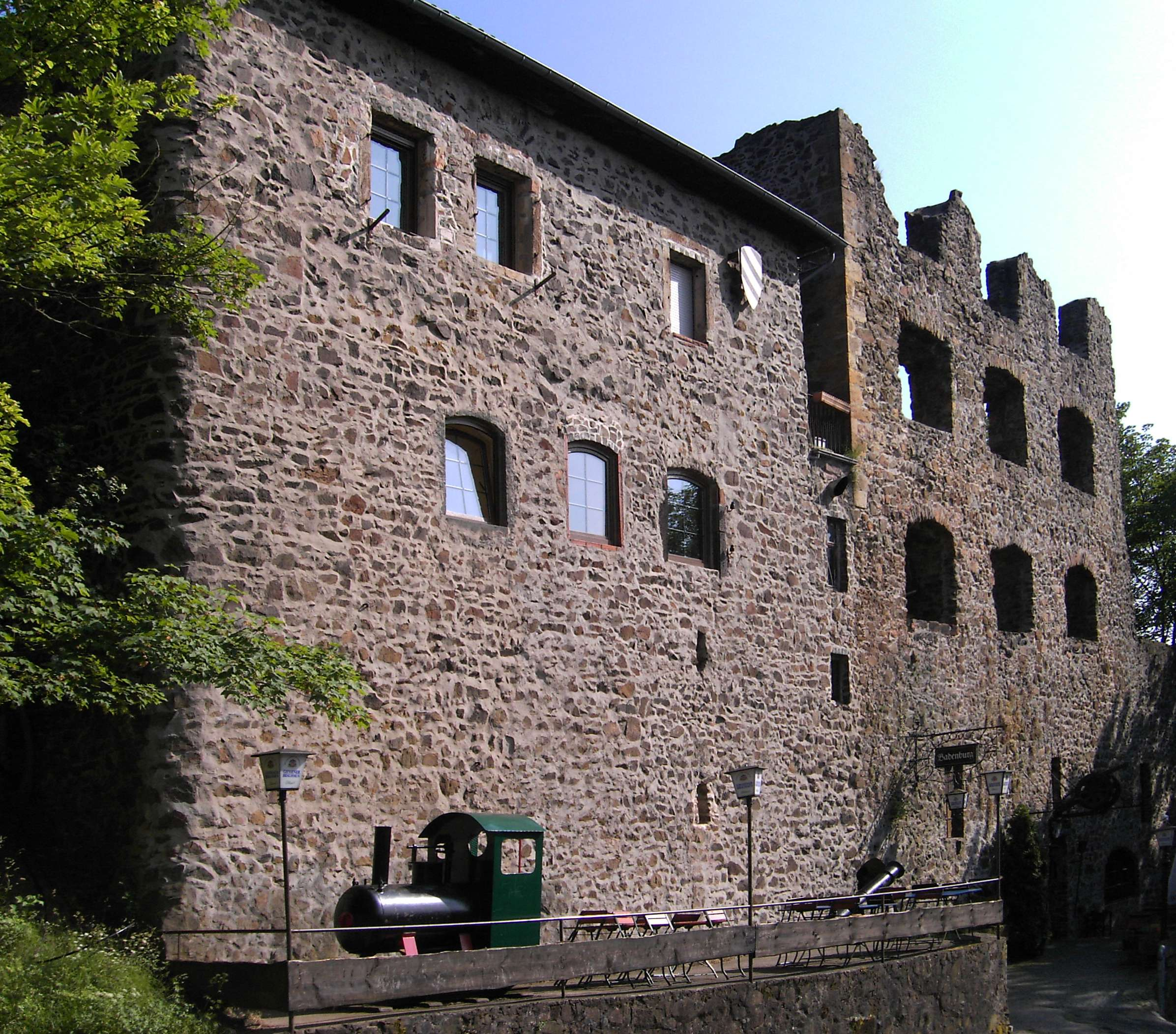 Badenburg bei Gießen, Deutschland. Frontseite zur Lahn.